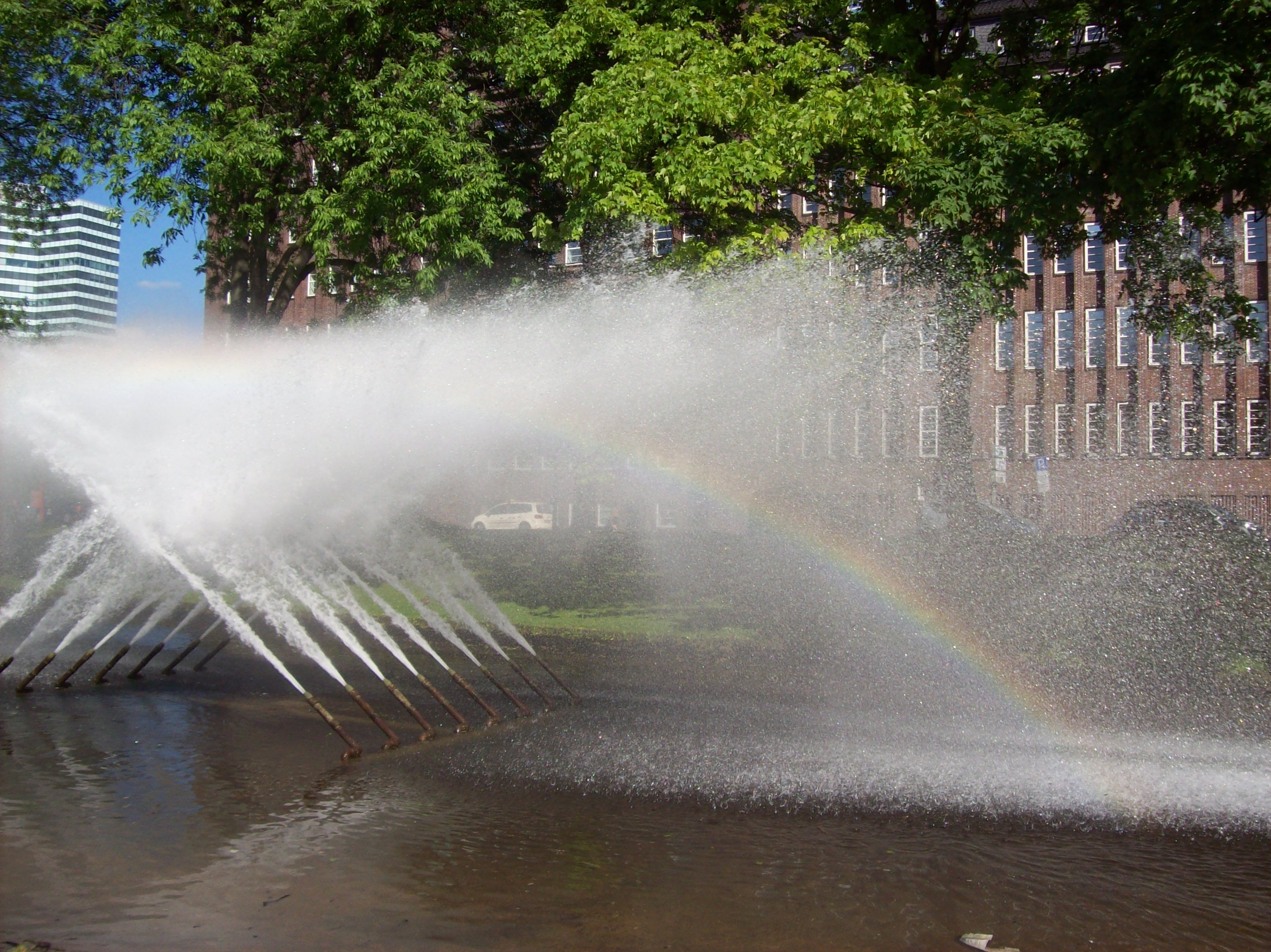 Regenbogen in der Wasserfontäne am Holstenwall im Park von Planten un Blomen, Hamburg-Neustadt.